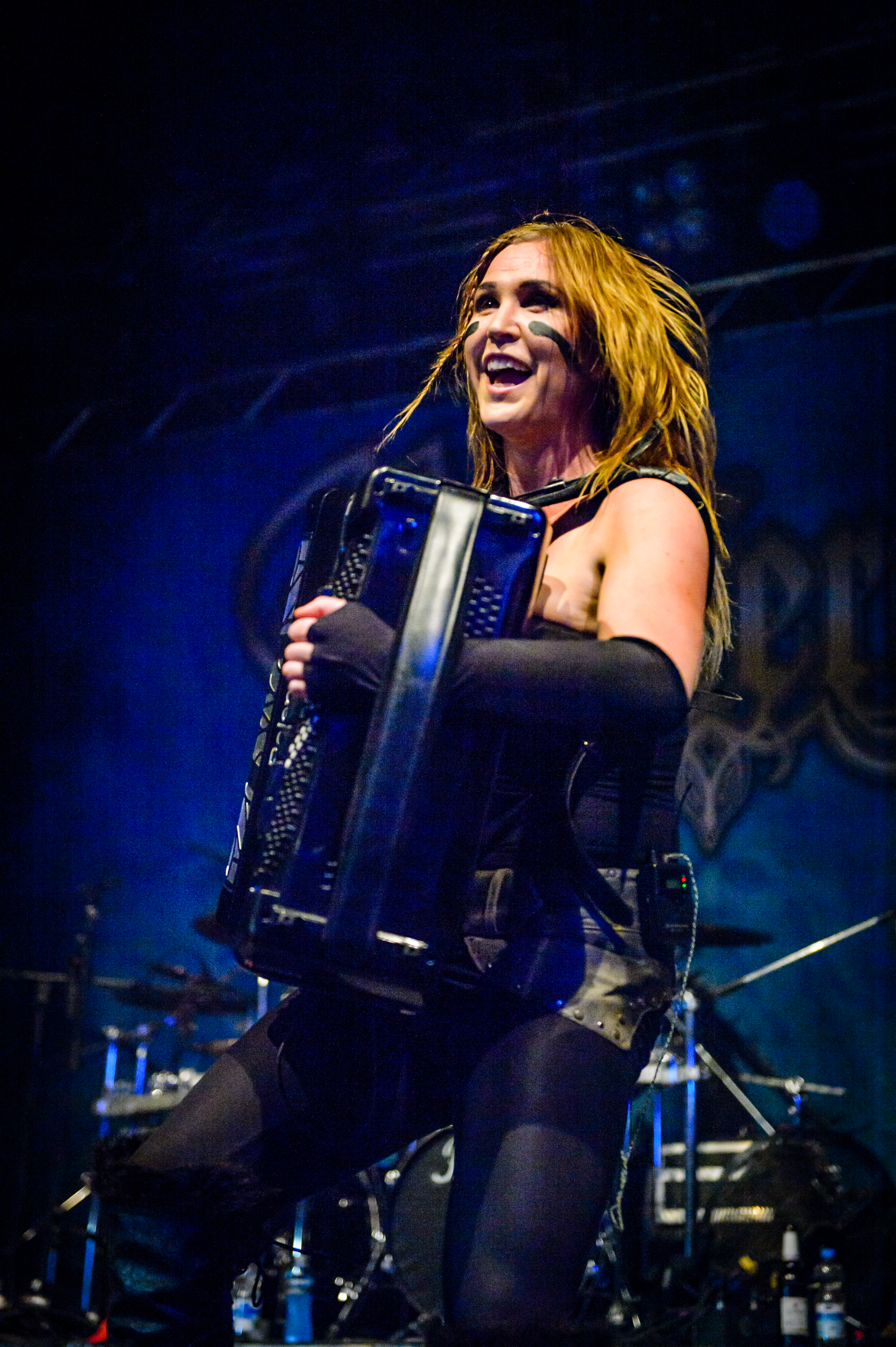 'Dong Open Air 2017; Neukirchen-Vluyn': 'Ensiferum'